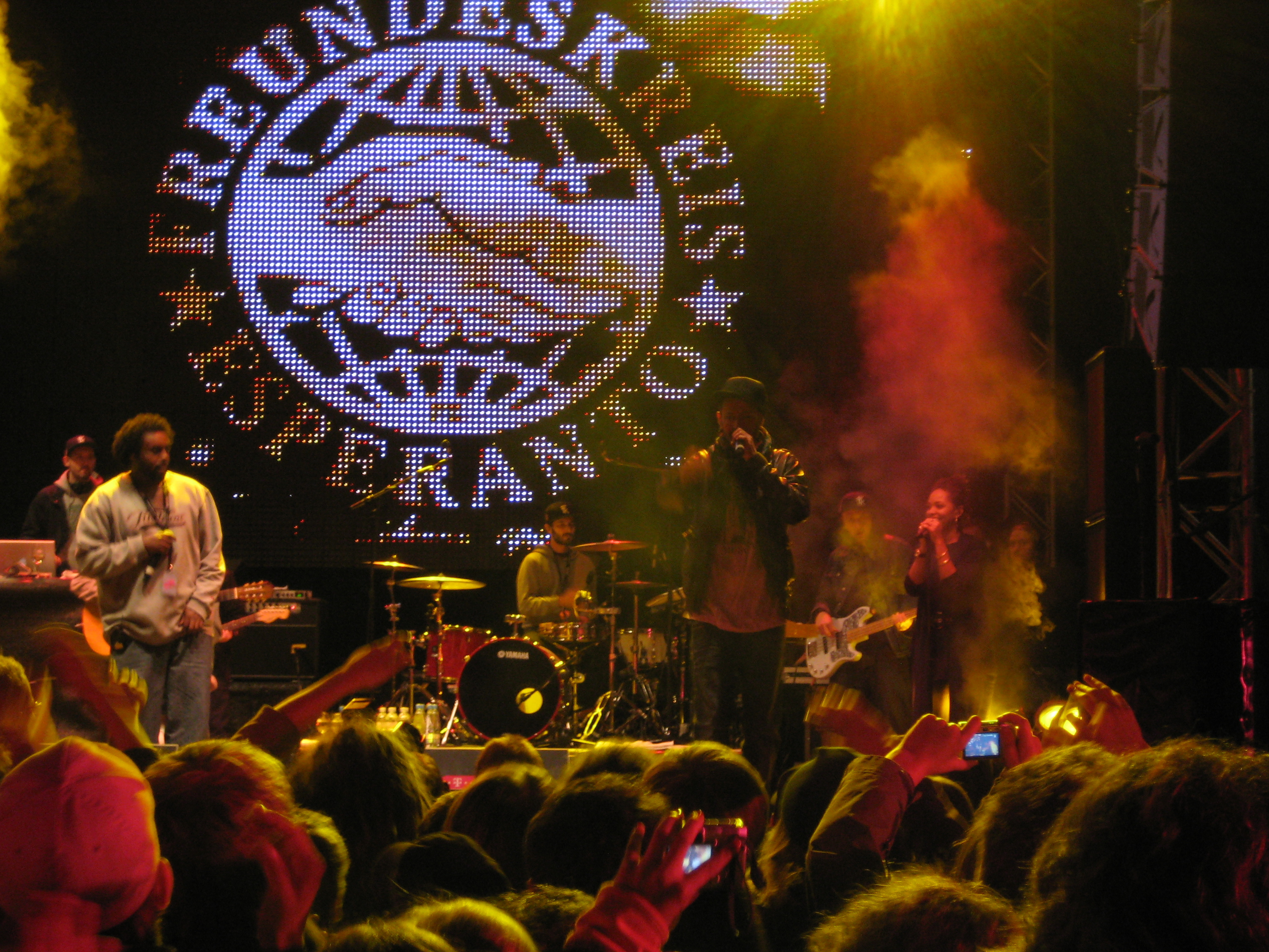 Freundeskreis bei seinem Abschiedskonzert am 19.09.2007 im GAZÍ-Stadion auf der Waldau in Stuttgart